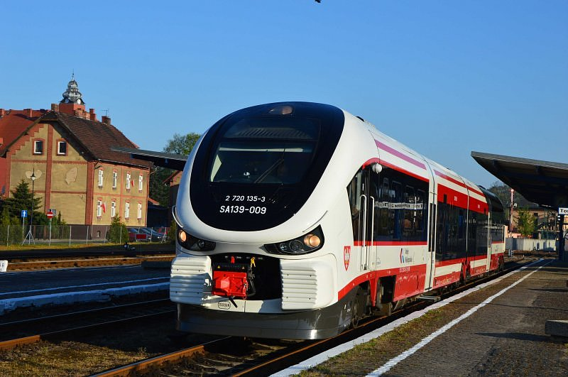 Spalinowy zespół trakcyjny SA139-009 w Wolsztynie.